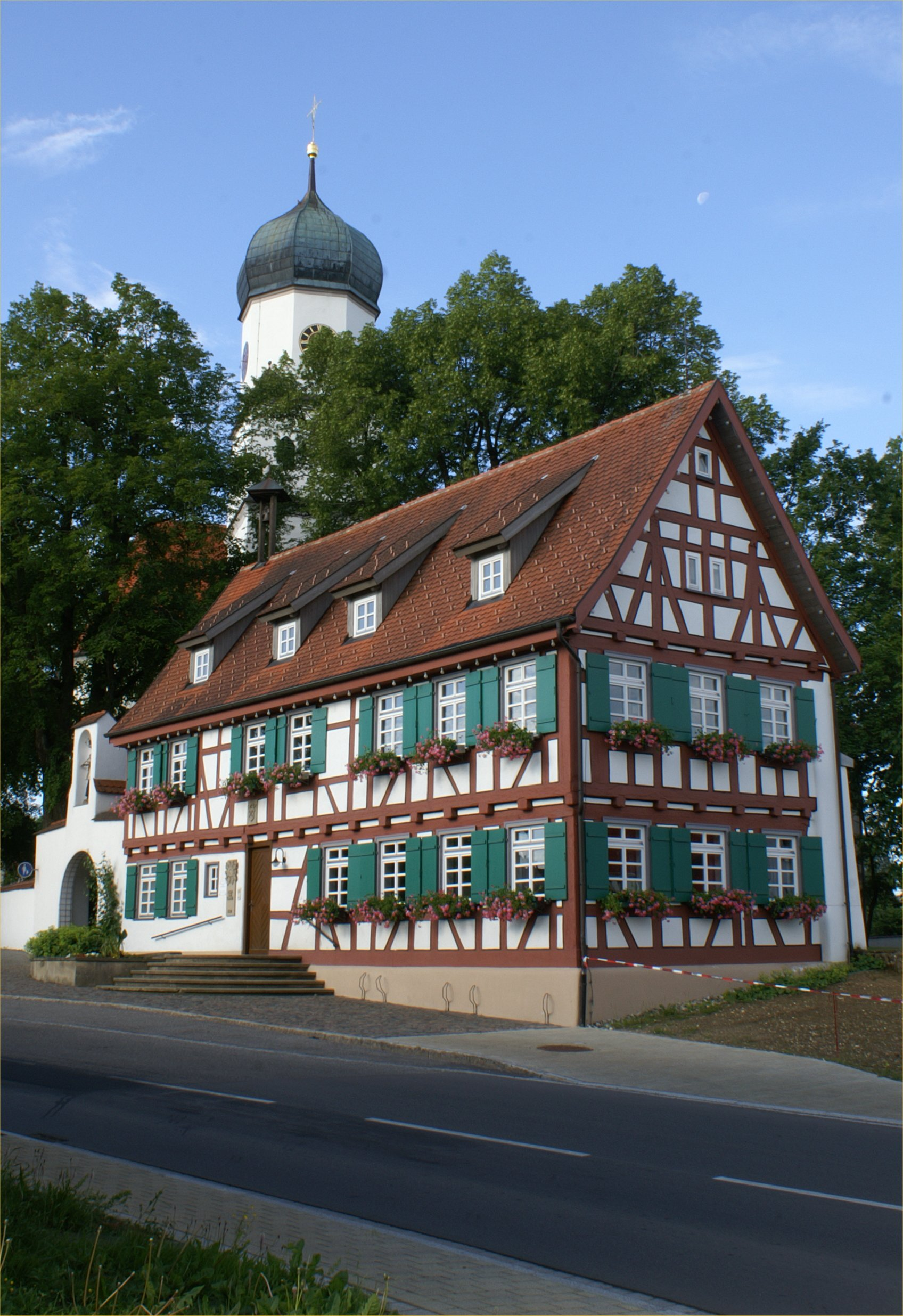 Dorfmitte von Westerheim (Württemberg) mit dem Haus des Gastes und dem Turm der St.-Stephanus-Kirche